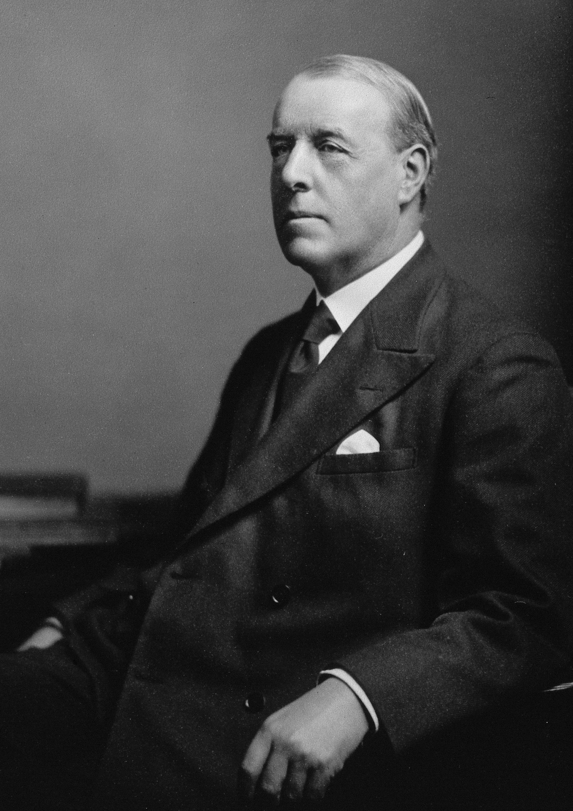 Samuel James Cameron